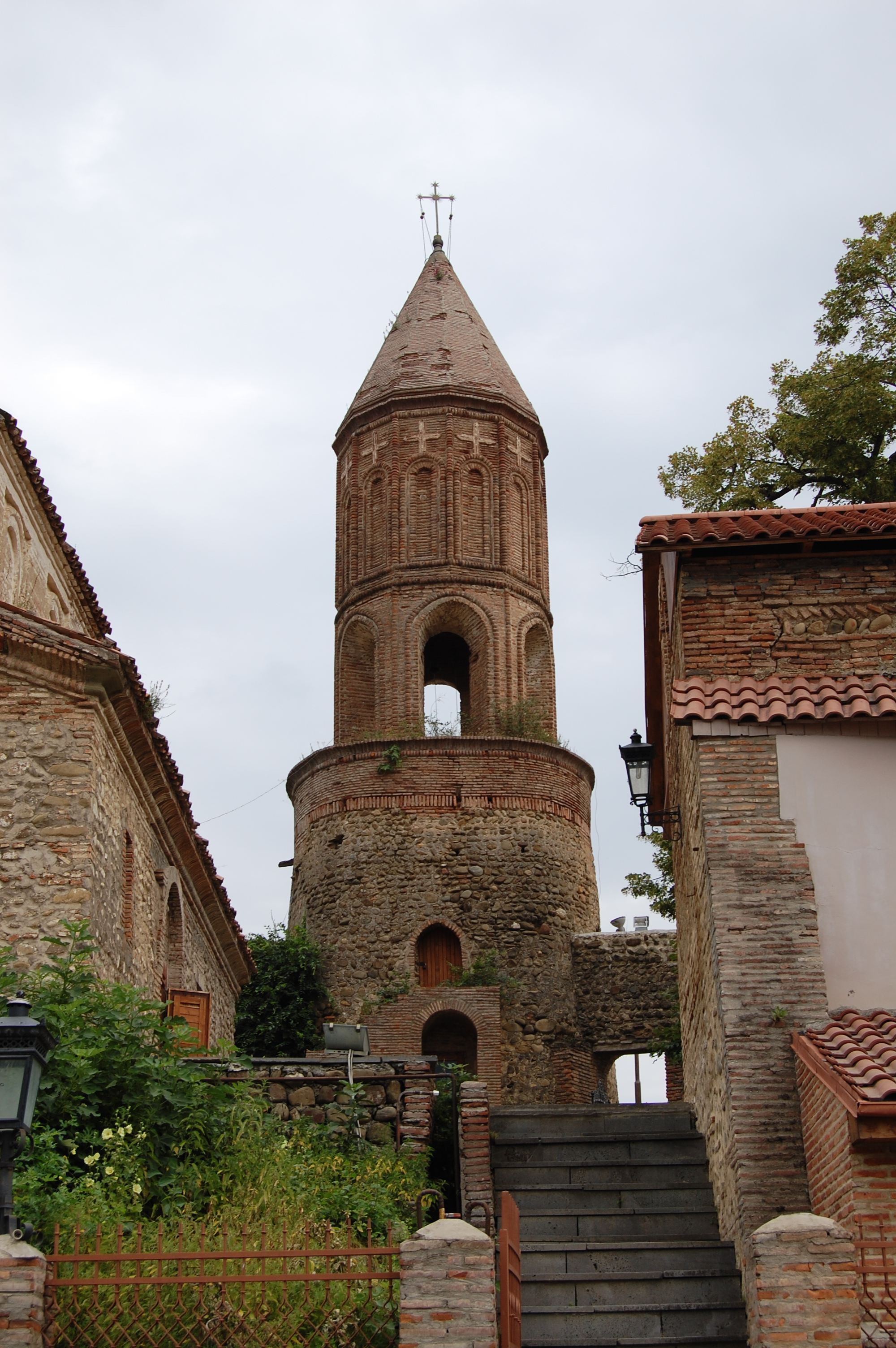 Sighnaghi Georgia - Sakartvelo